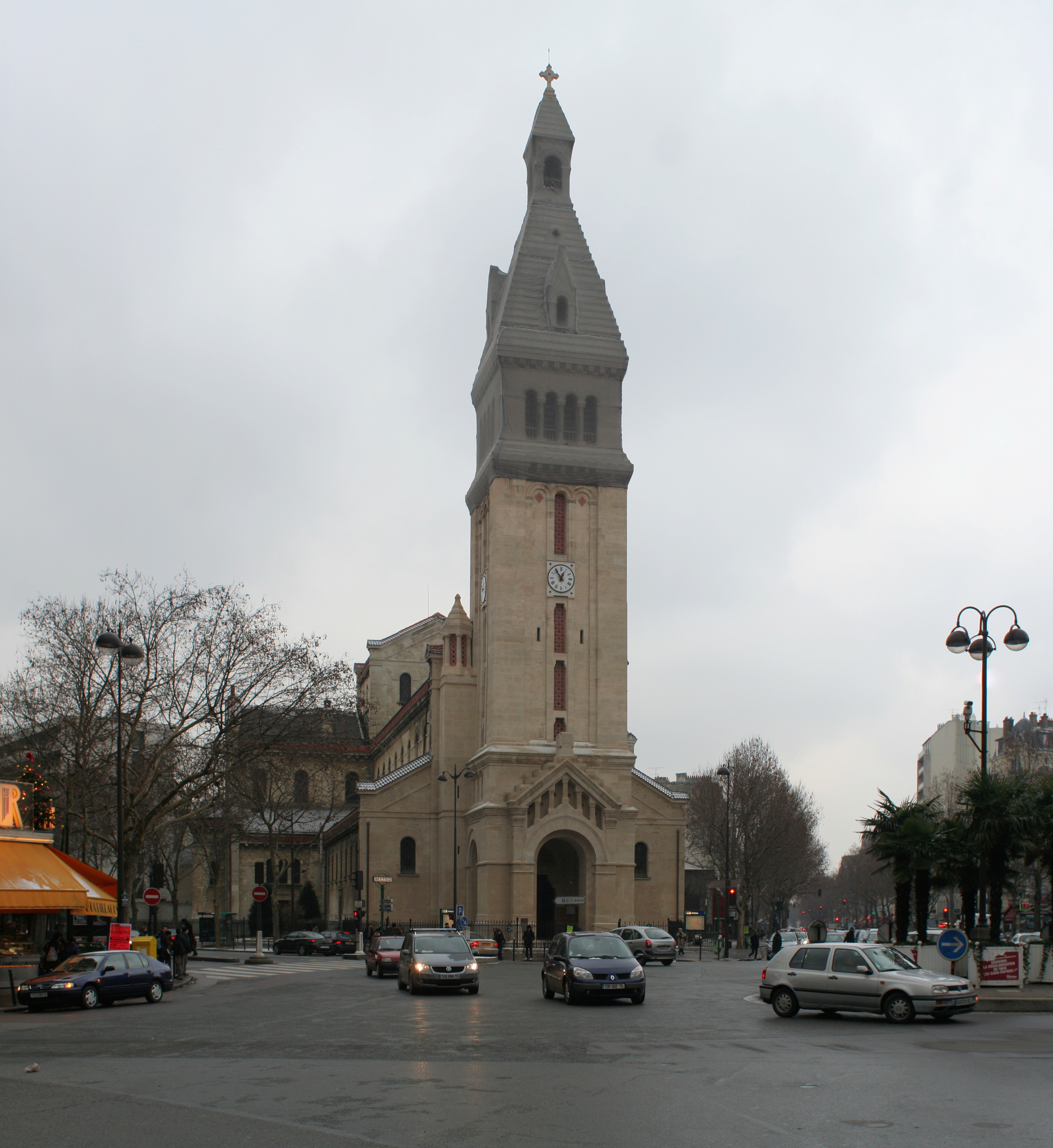 Église Saint-Pierre-de-Montrouge, façade occidentale.